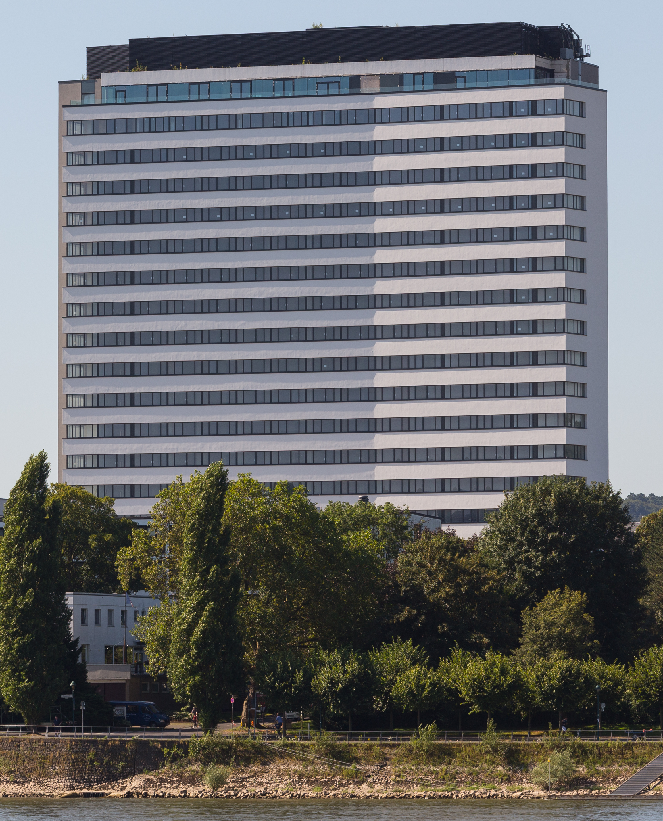 Hotel des World Conference Center Bonn (WCCB): Rheinseite